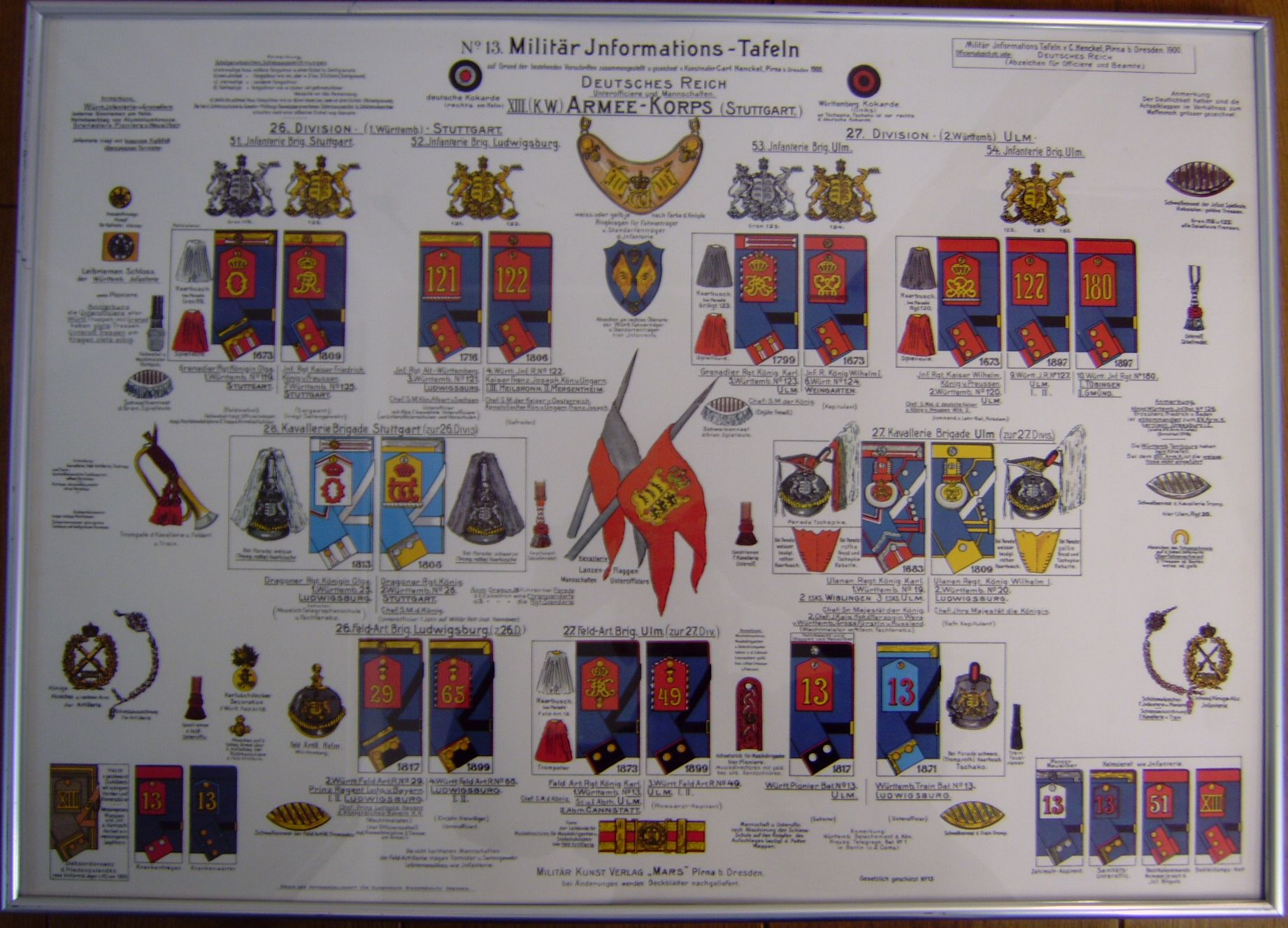 Darstellung der Truppenteile des XIII. (Königlich Württembergischen) Armee-Korps